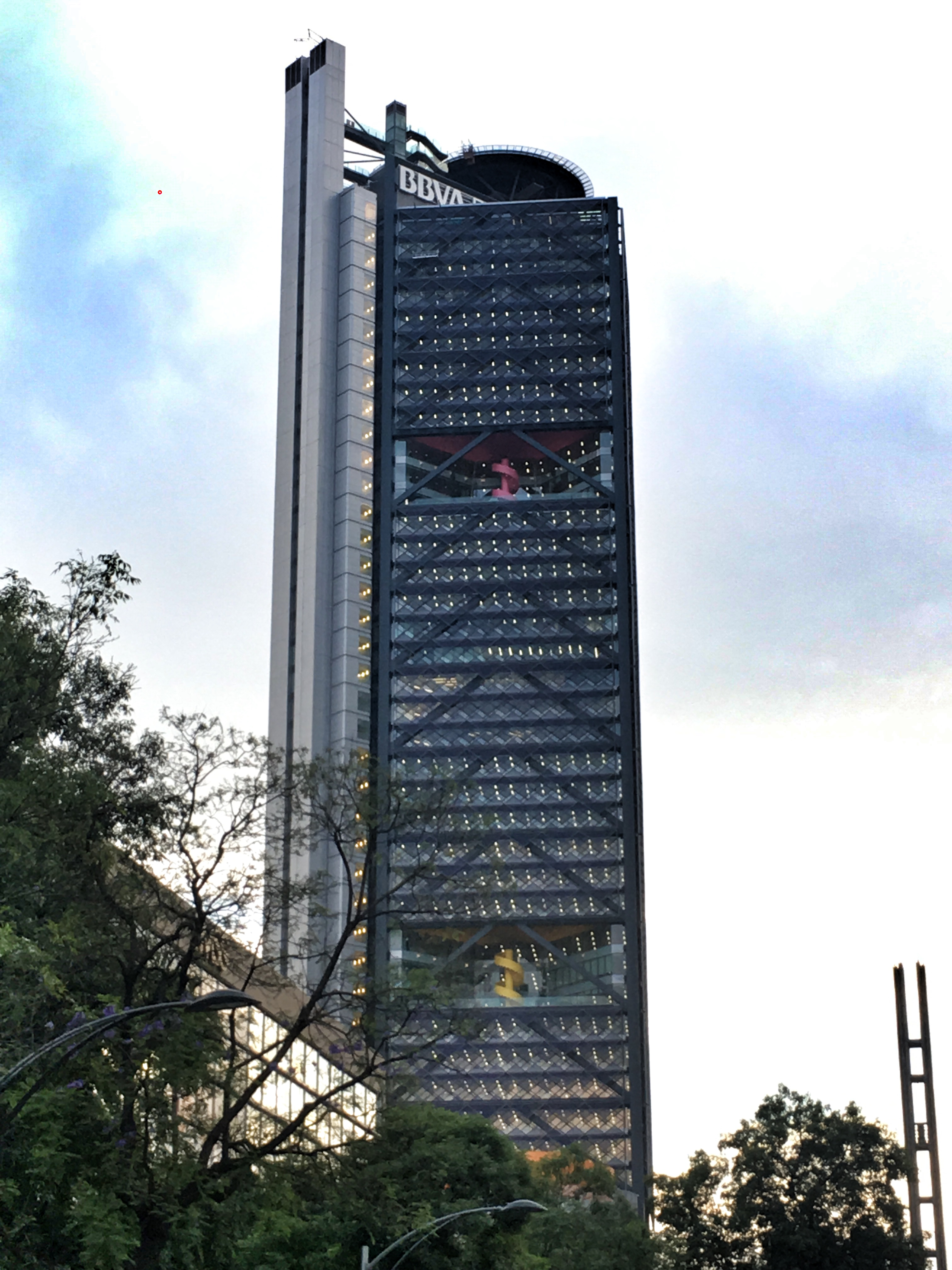 Torre BBVA Bancómer, col. Juárez, Ciudad de México